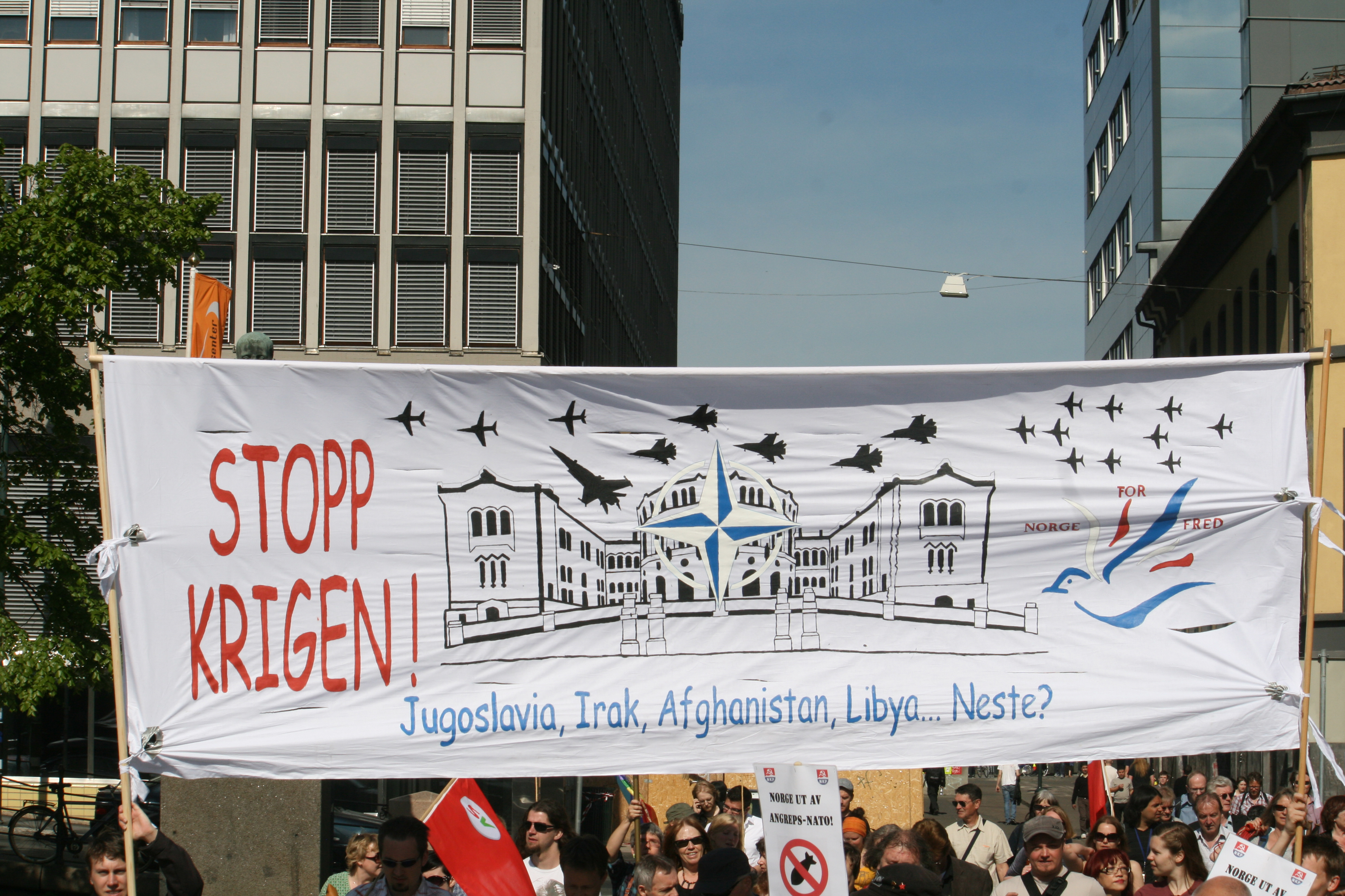 Stopp krigen! Jugoslavia, Irak, Afghanistan, Libya ... neste?